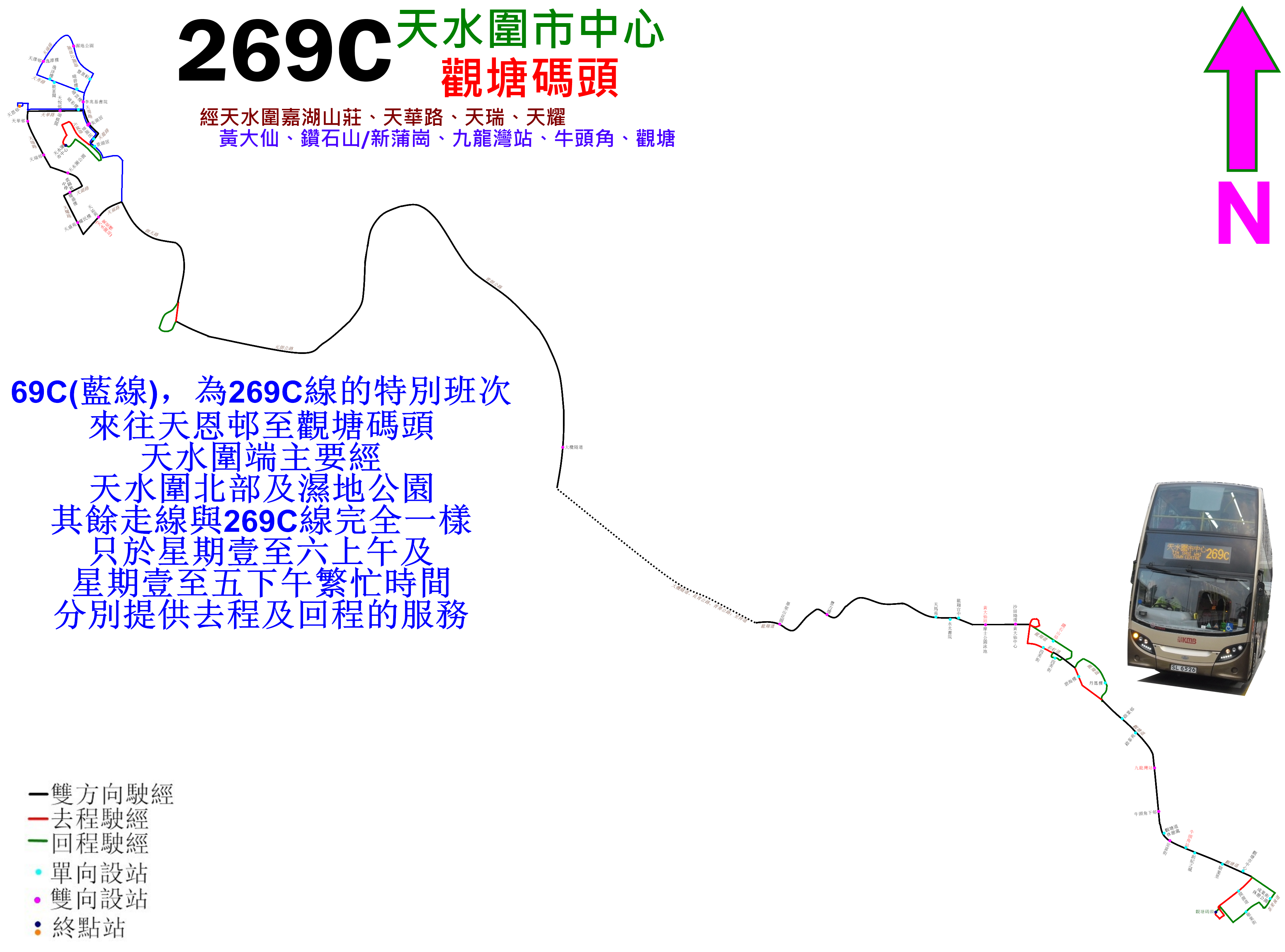 中文（香港）: 九巴269C線的走線圖